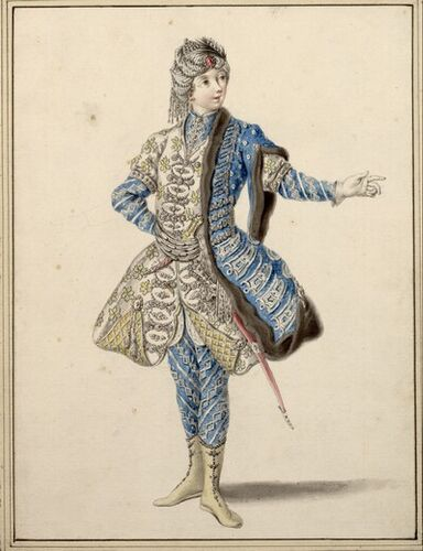 Vestiario del Solimano Opera 2. Der Kastrat Angelo Maria Monticelli als Selimo 24-teiliger Zyklus (inklusive Titelblatt) Zeichnung / Feder in Grau und Braun, Graulavierungen, aquarelliert